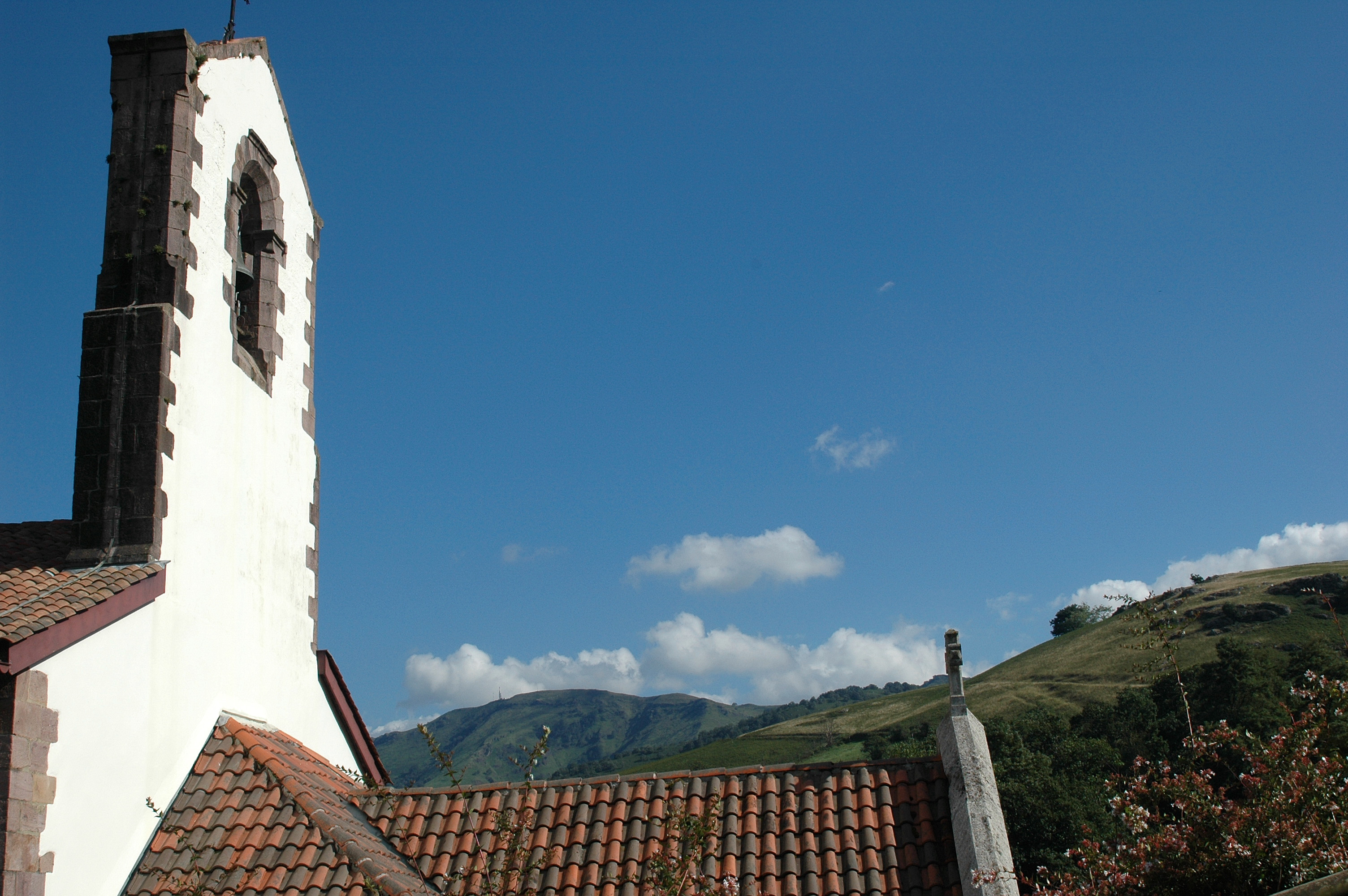 Saint-Martin d'Arrossa, l'église Saint Martin face aux montagnes. Photo prise le 03/08/06 par Harrieta171